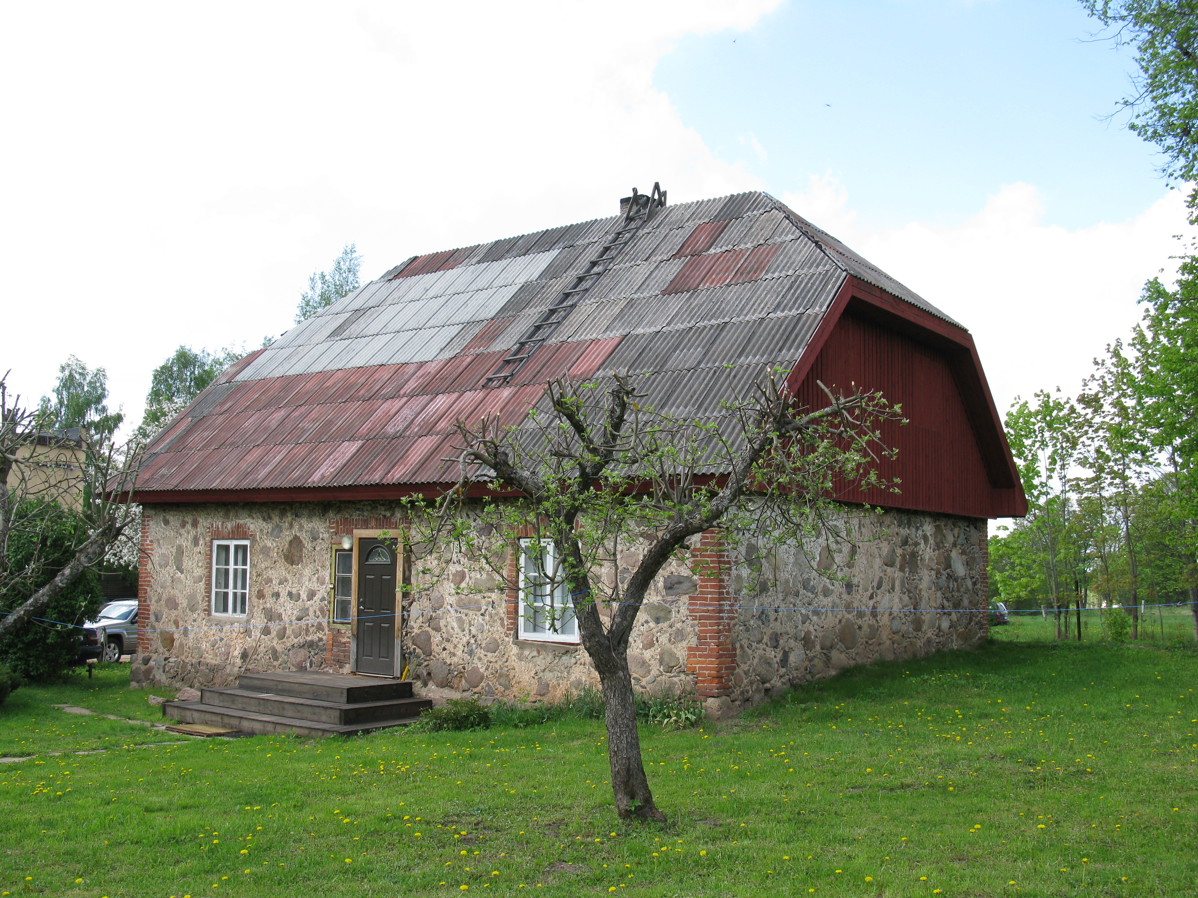 1863 ehitatud Vana-Kuuste kohtumaja